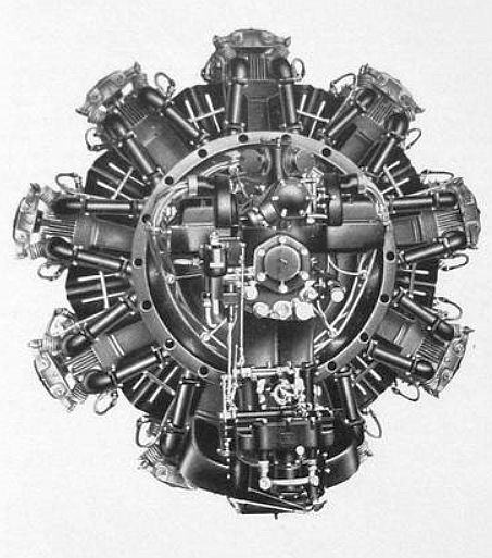 letecký motor Walter Pegas II-M2 (1936) pohled zezadu, licence Bristol